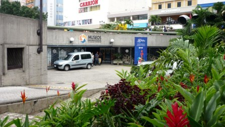 Entrada a los Museos del Banco Central de Costa Rica, ubicados bajo la Plaza